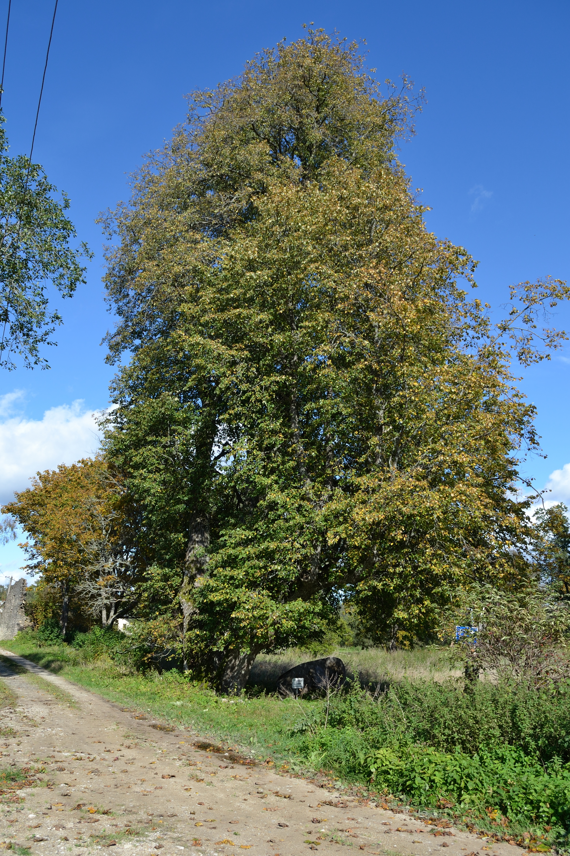 Värava pärn, Hagudi mõis